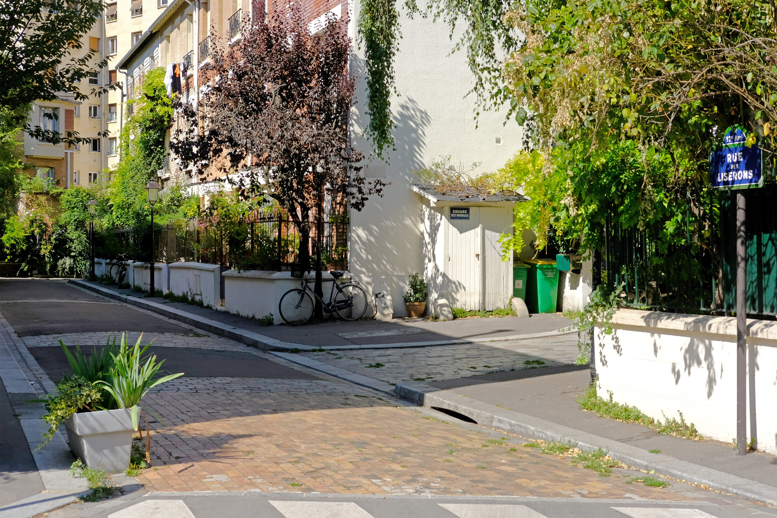 Cité florale (rue des Liserons) - Paris XIII